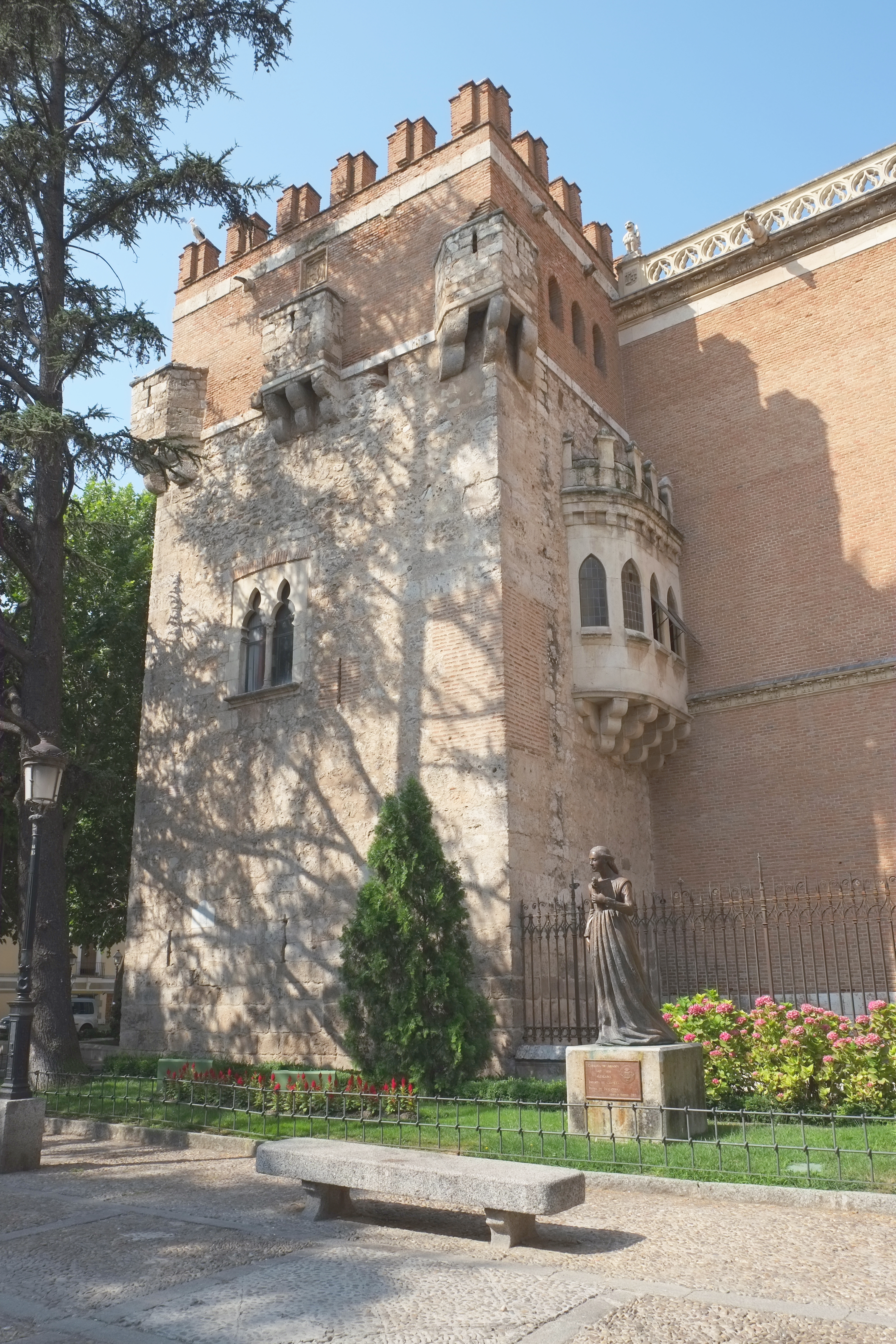 Bischofspalast in Alcalá de Henares, Spanien